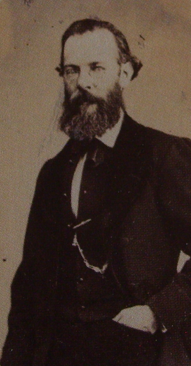 El abogado Teziuteco Rafael Martínez de la Torre